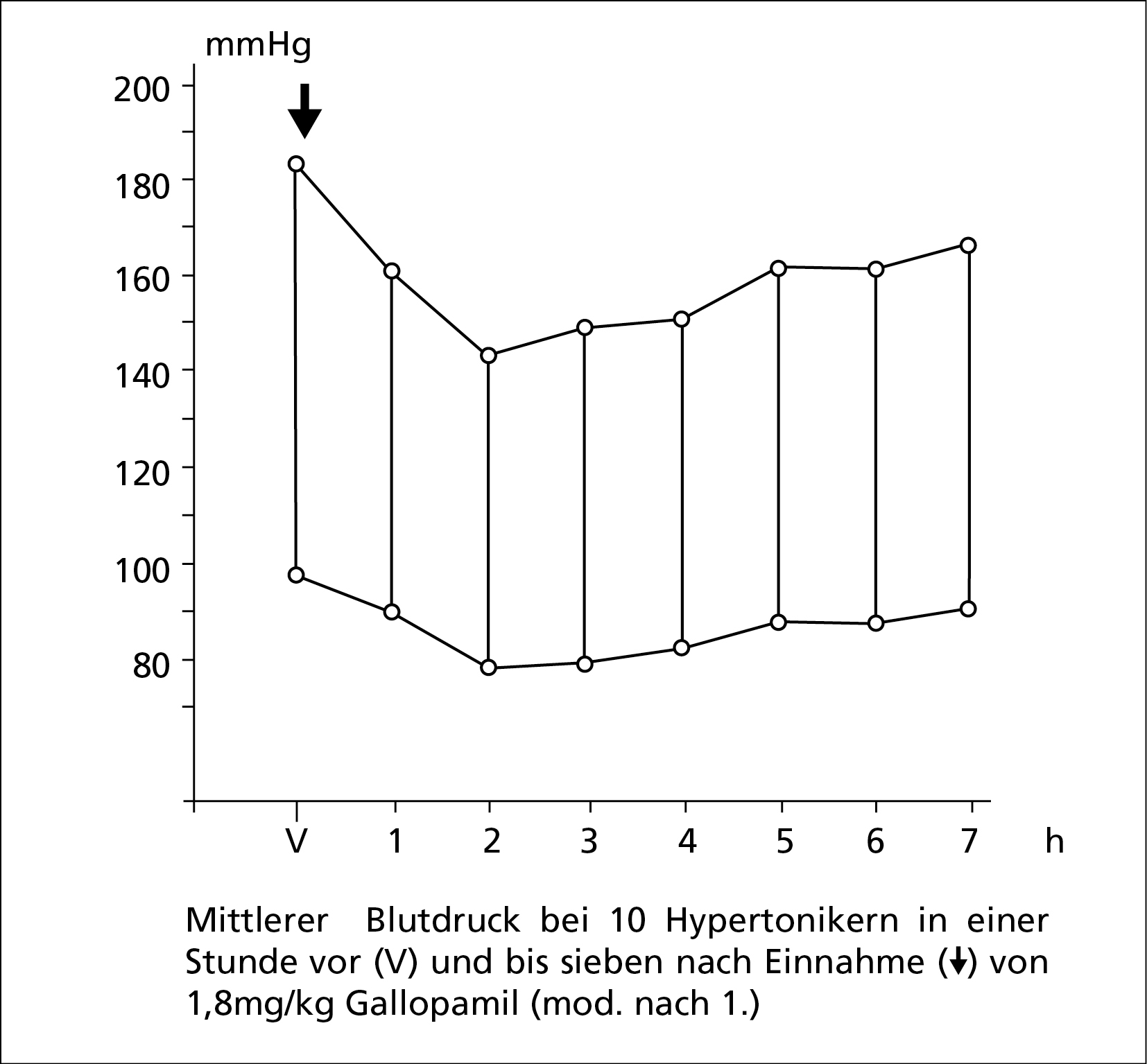 hypertension arterielle